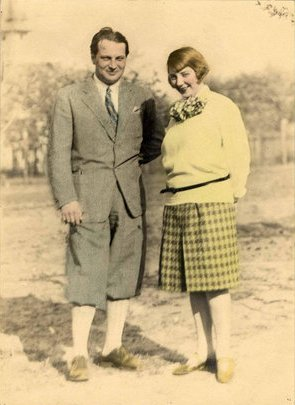 Abonyi Géza (1894-1949) magyar színész, ismeretlen nő társaságában